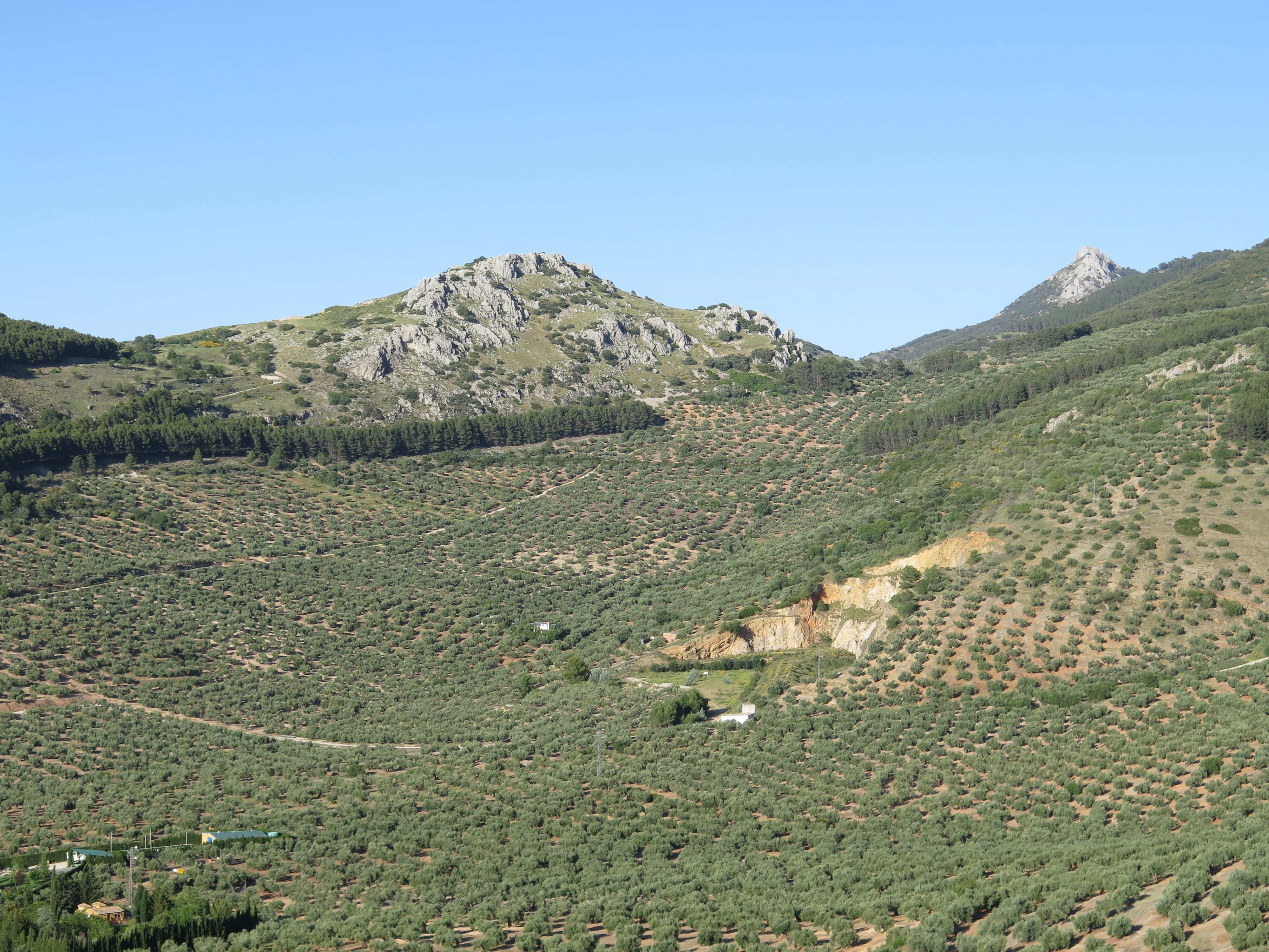 Olivar junto a Jamilena.